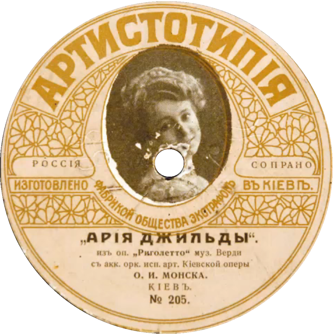 «Artistotipia» gramophone plate lable, issue #205, Olga Monska as Gilda in Rigoletto Verdi